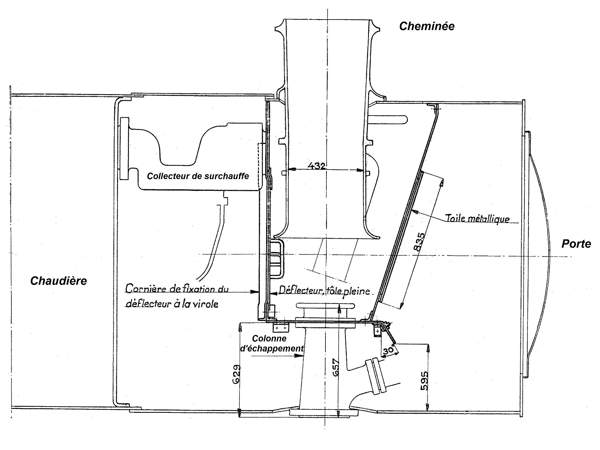 Dessin d'époque de la boîte à fumée d'une 141 R équipée du Self-cleaning.